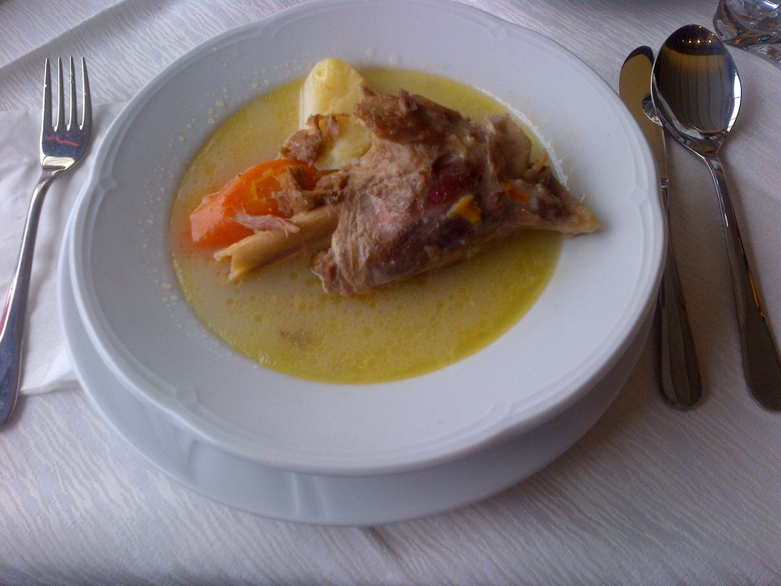 Kuzu haşlama es un estofado de carne de cordero de la cocina turca.